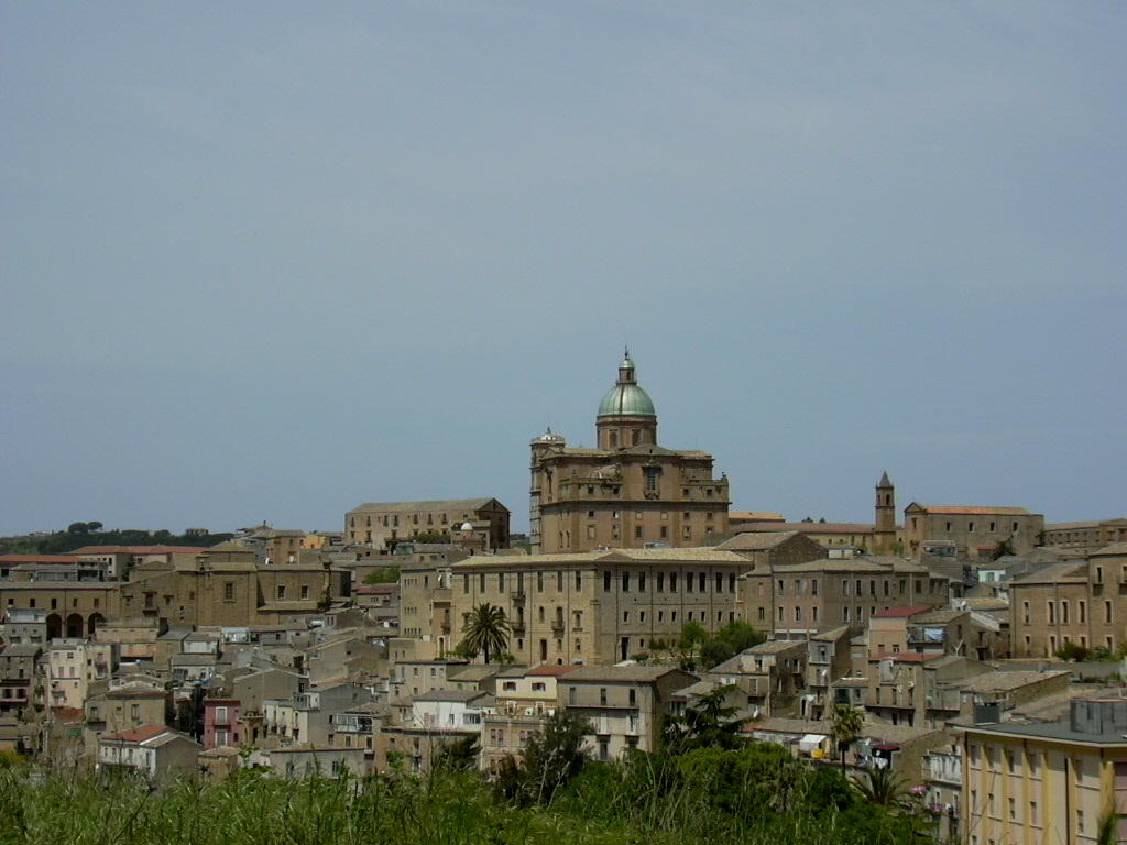 Piazza Armerina EN_Sicilia: Panorama